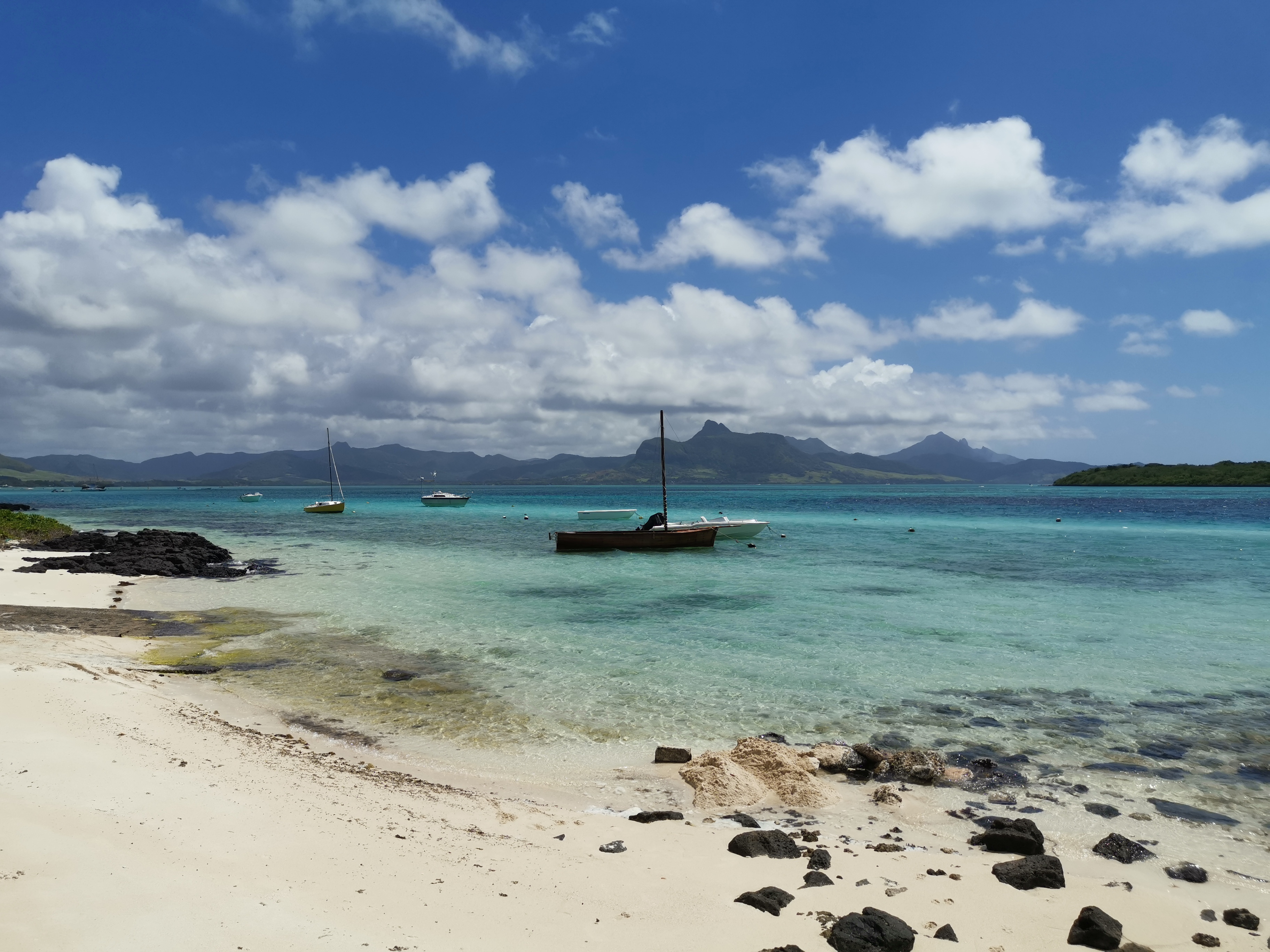 Pointe d'Esny an der Ostküste von Mauritius